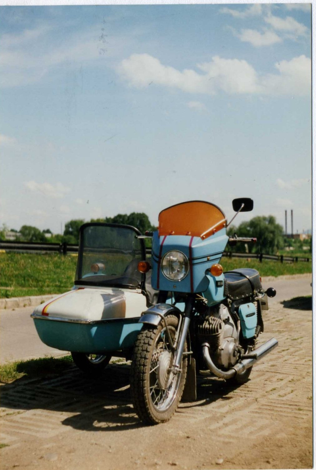 ИЖ Юпитер-4